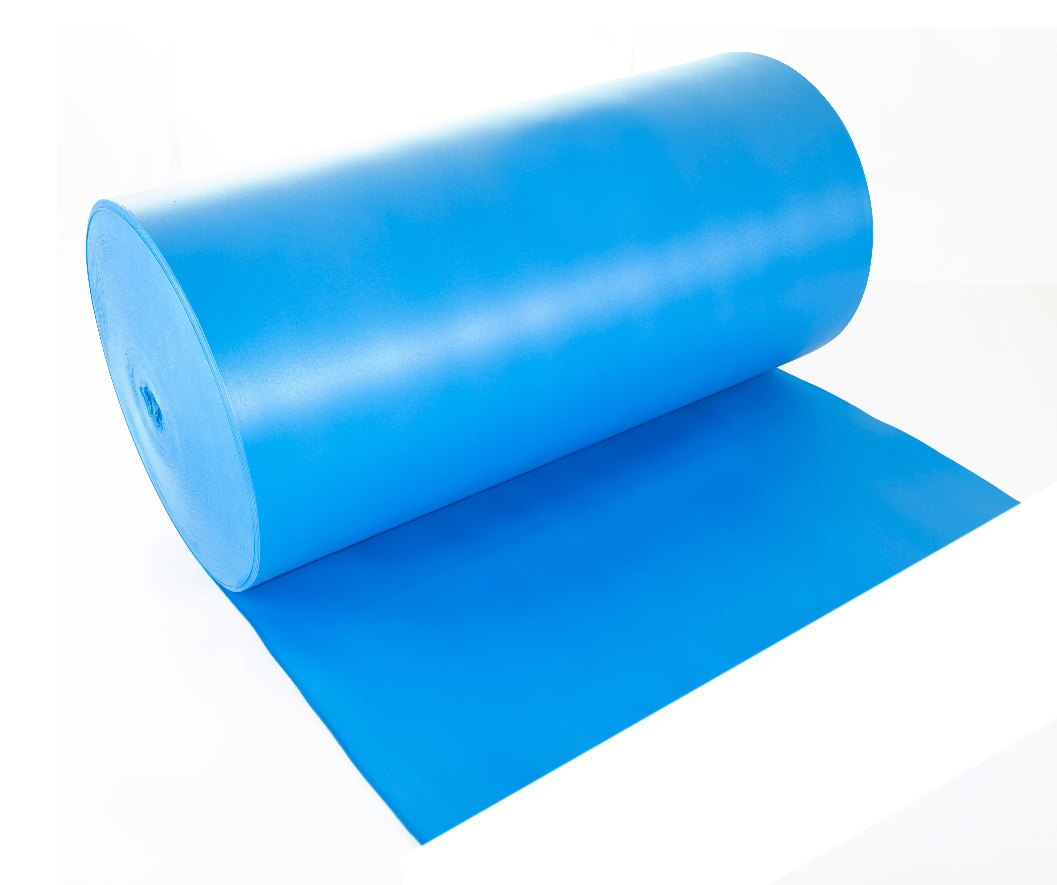 Рулон физически сшитого пенополиэтилена (ППЭ)